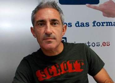 El periodista español Jon Sistiaga en 2012 durante una entrevista para un periódico digital.